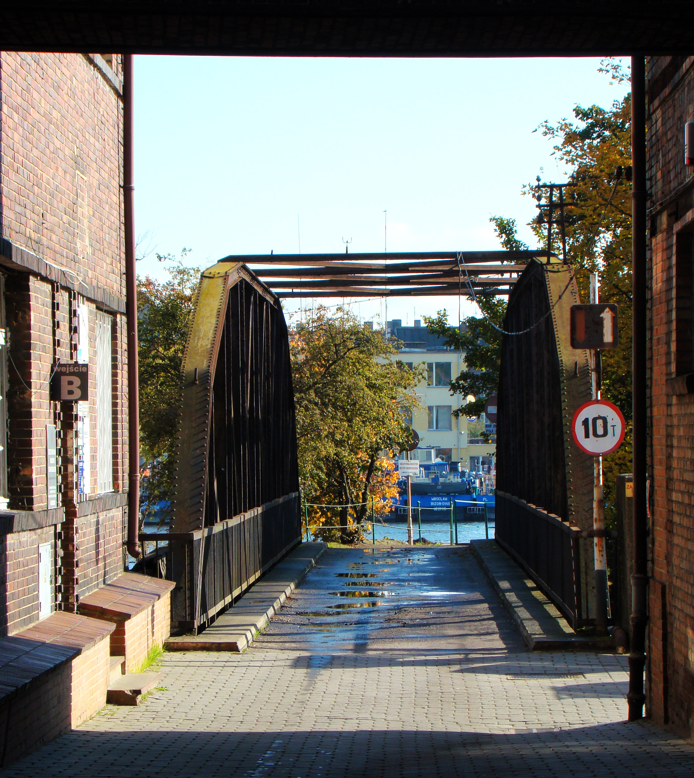 Most na Wyspę Jaskółczą, Szczecin, Polska